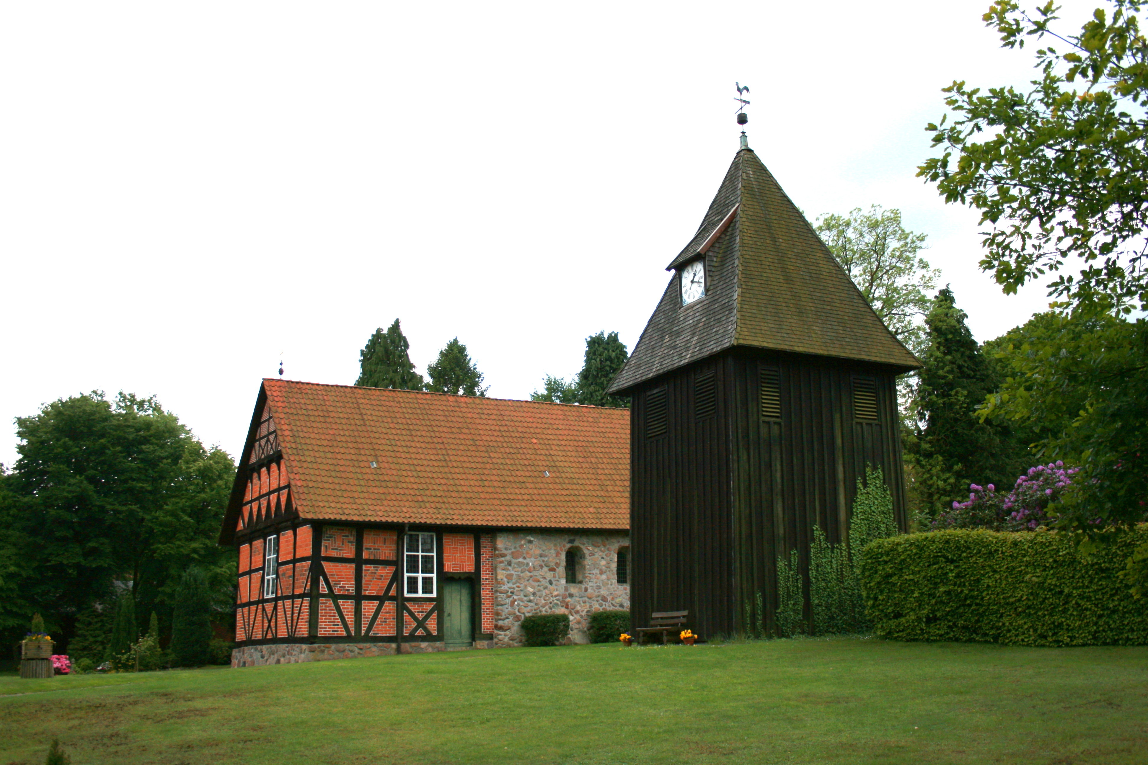 St. Magdalenen in Undeloh